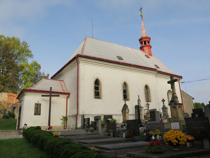 Kostel svatého Jiljí, severovýchodní okraj obce, Mladějov.